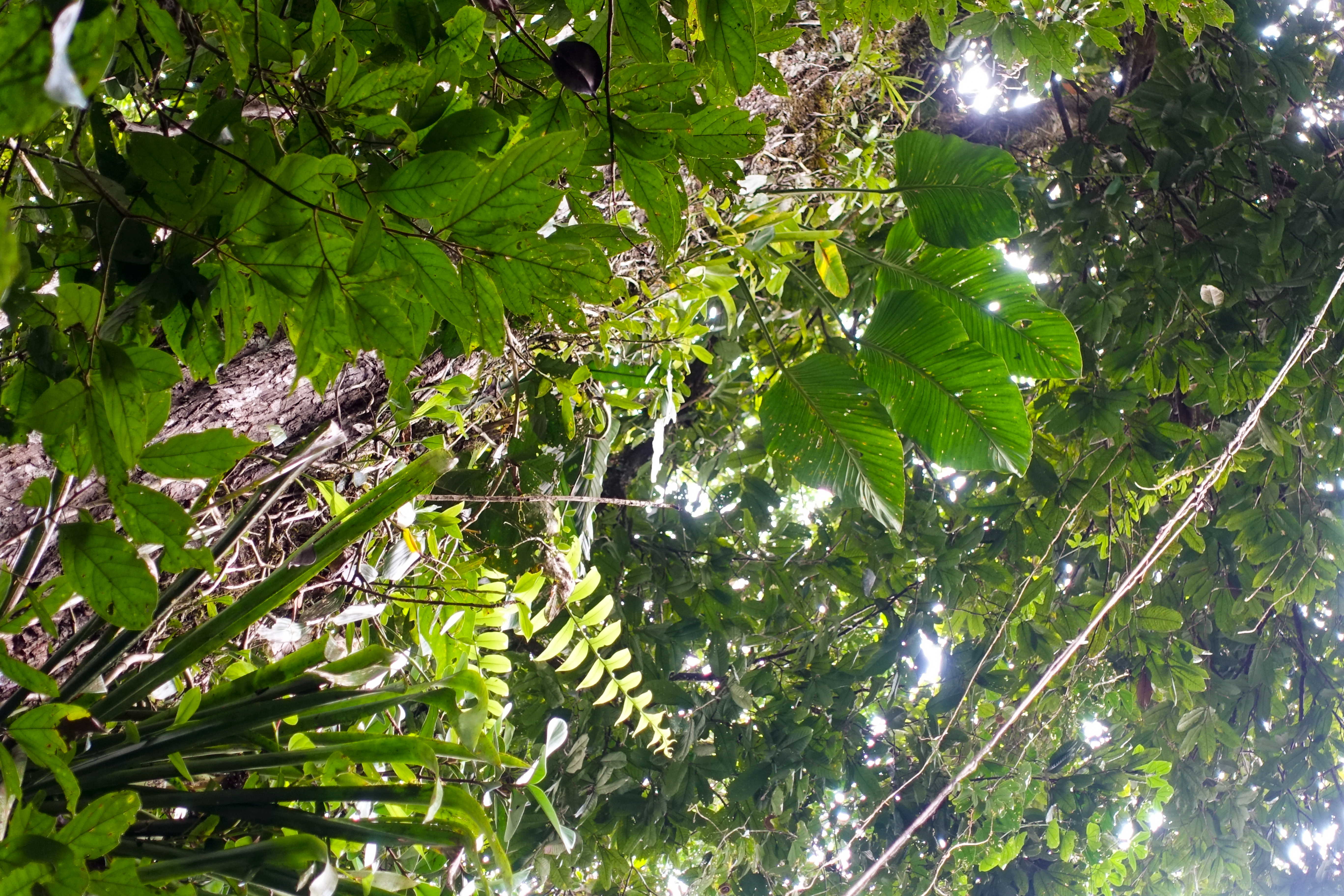 Pflanzliche Biomasse, ecuadorianischer Regenwald